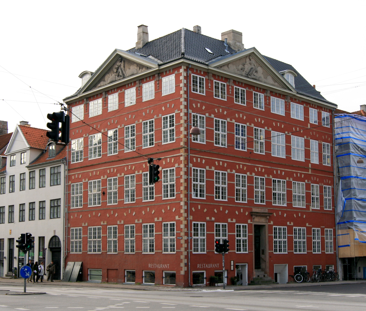 Strandgade 14, København. Bygget 1653. Fredet.